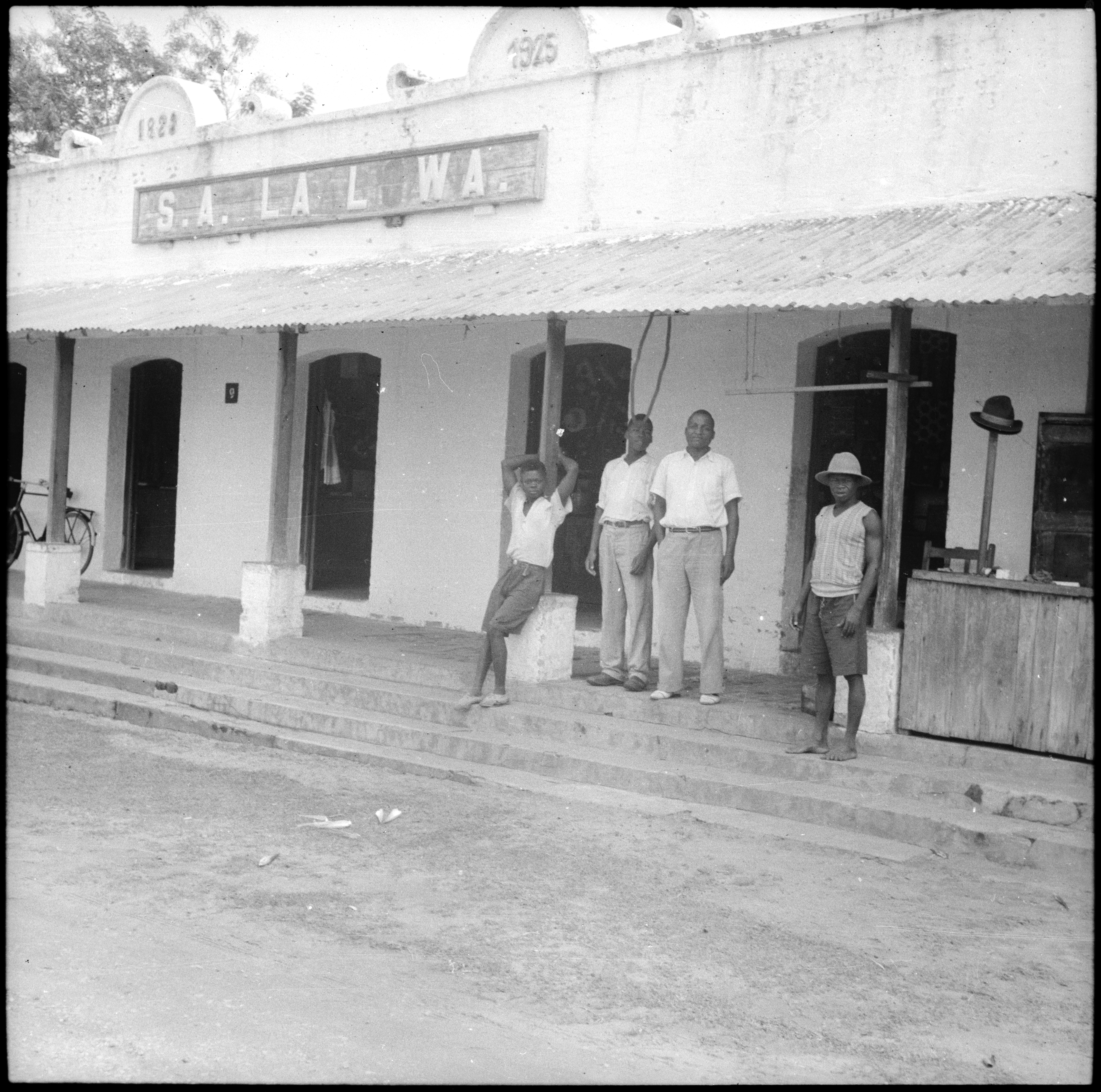 Belgisch-Kongo, Lisala: Gebäude; Mehrere Männer vor einem Gebäude stehend, angeschrieben mit "S.A. La Lowa"